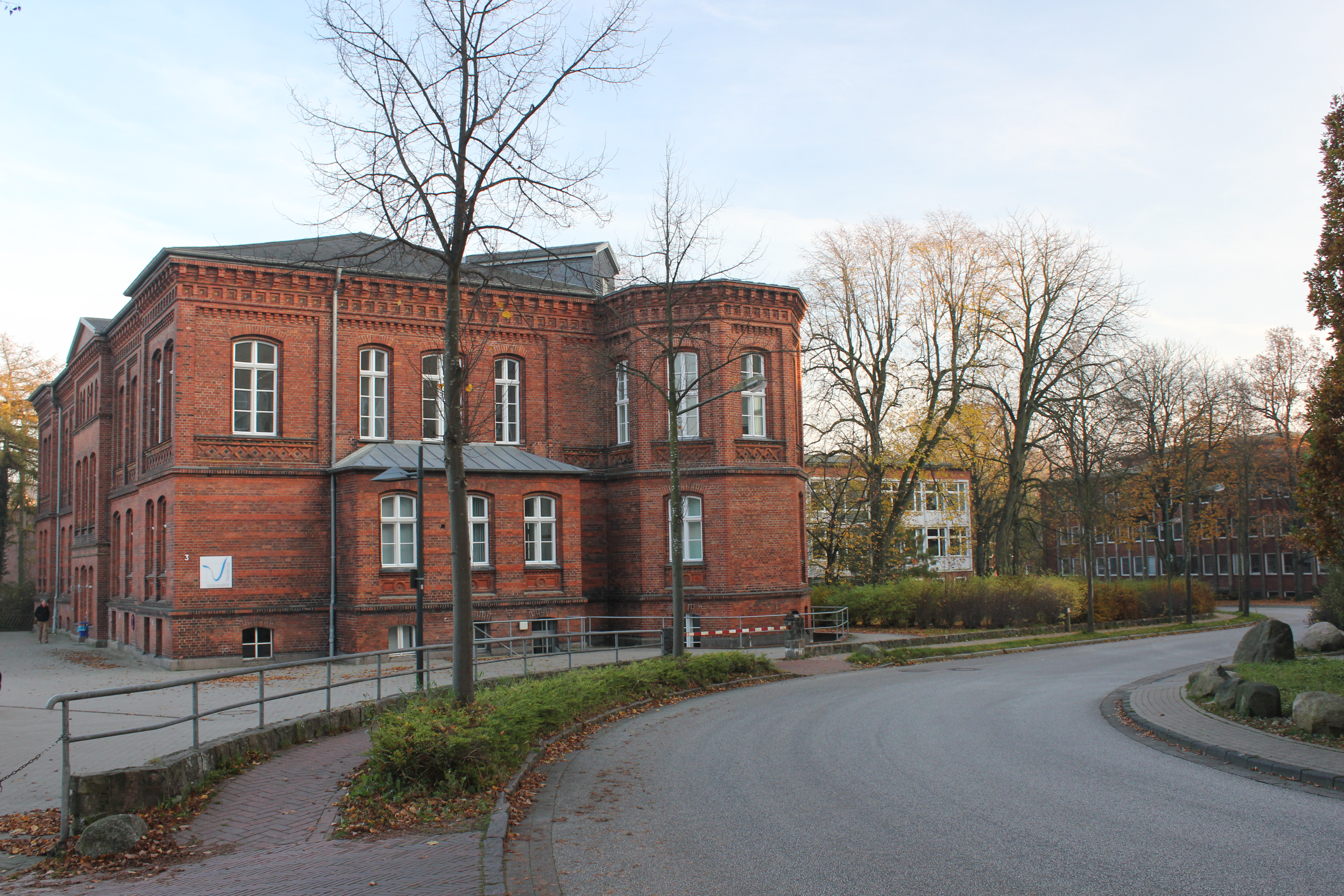 Universität Flensburg – Gebäude Munketoft (2011)